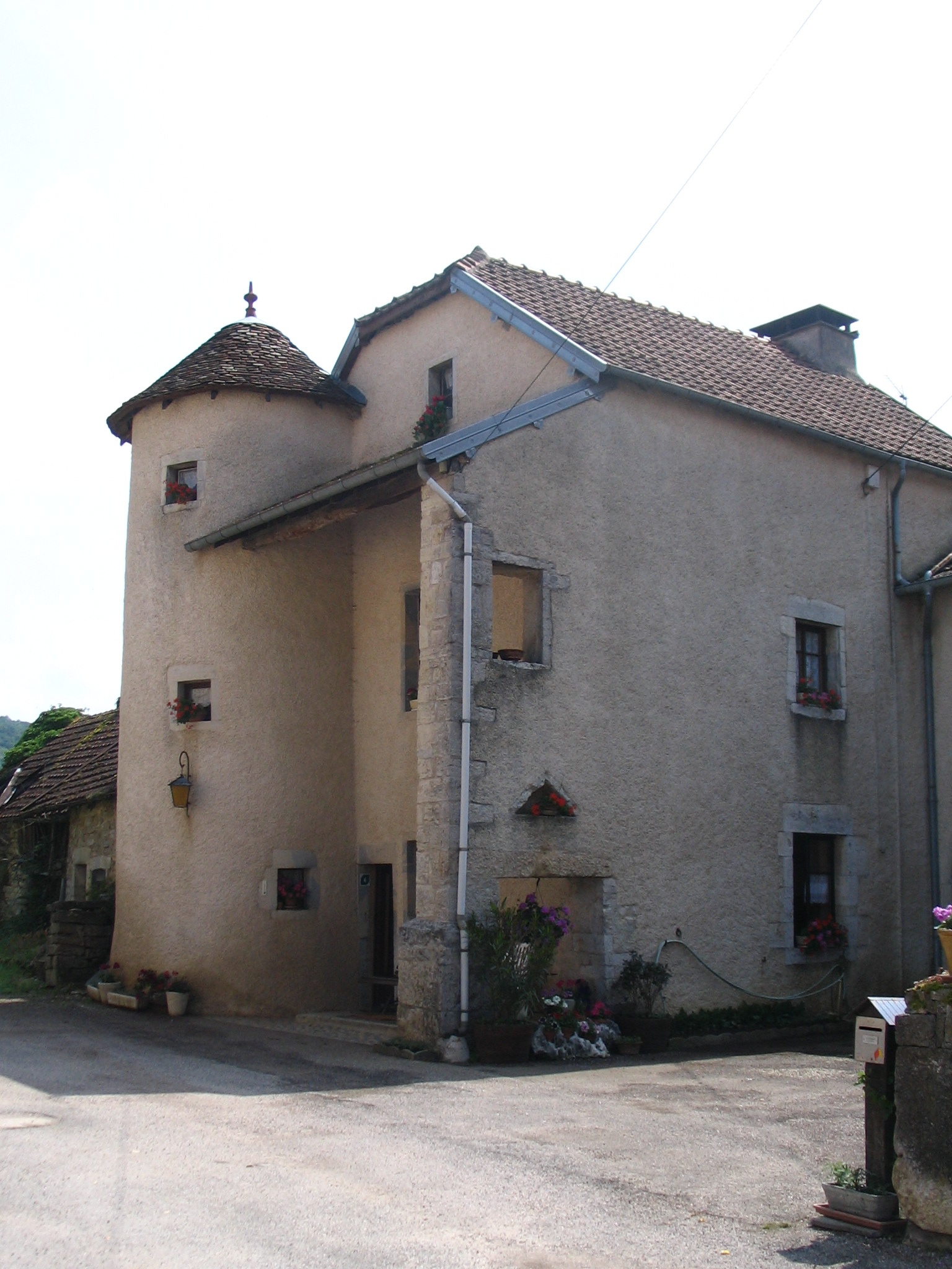 Une maison à tour à Mailley-Chazelot